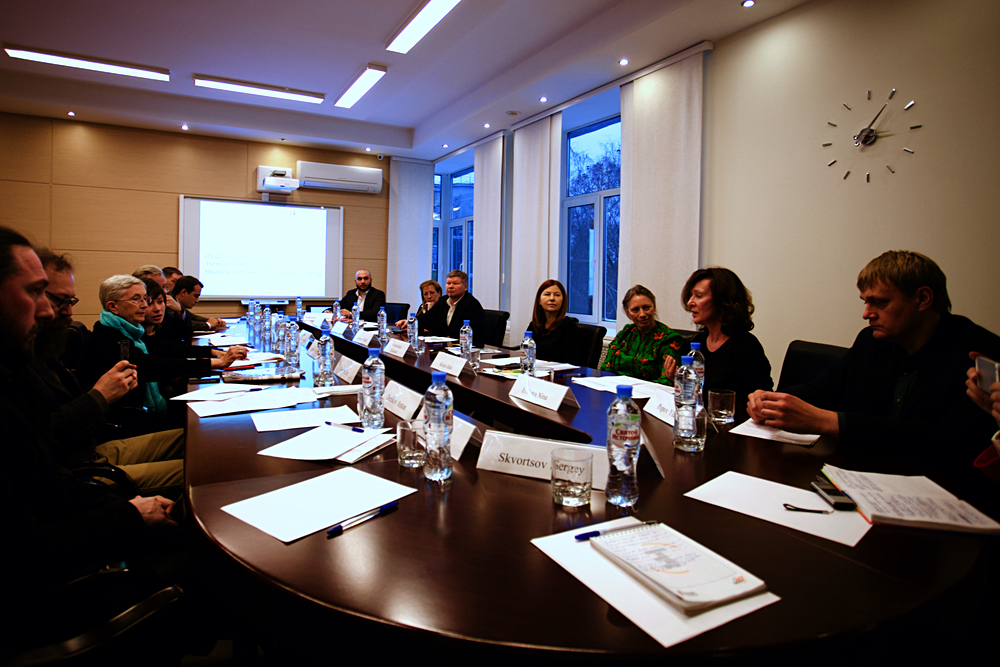 Елизавета Солонченко встретилась с экспертом-урбанистом Мэрилин Хэмельтон и обсудила перспективы развития Нижнего Новгорода 24 ноября 2017 года.